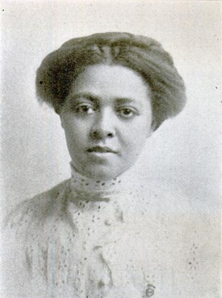 Bessie Bruington Burke